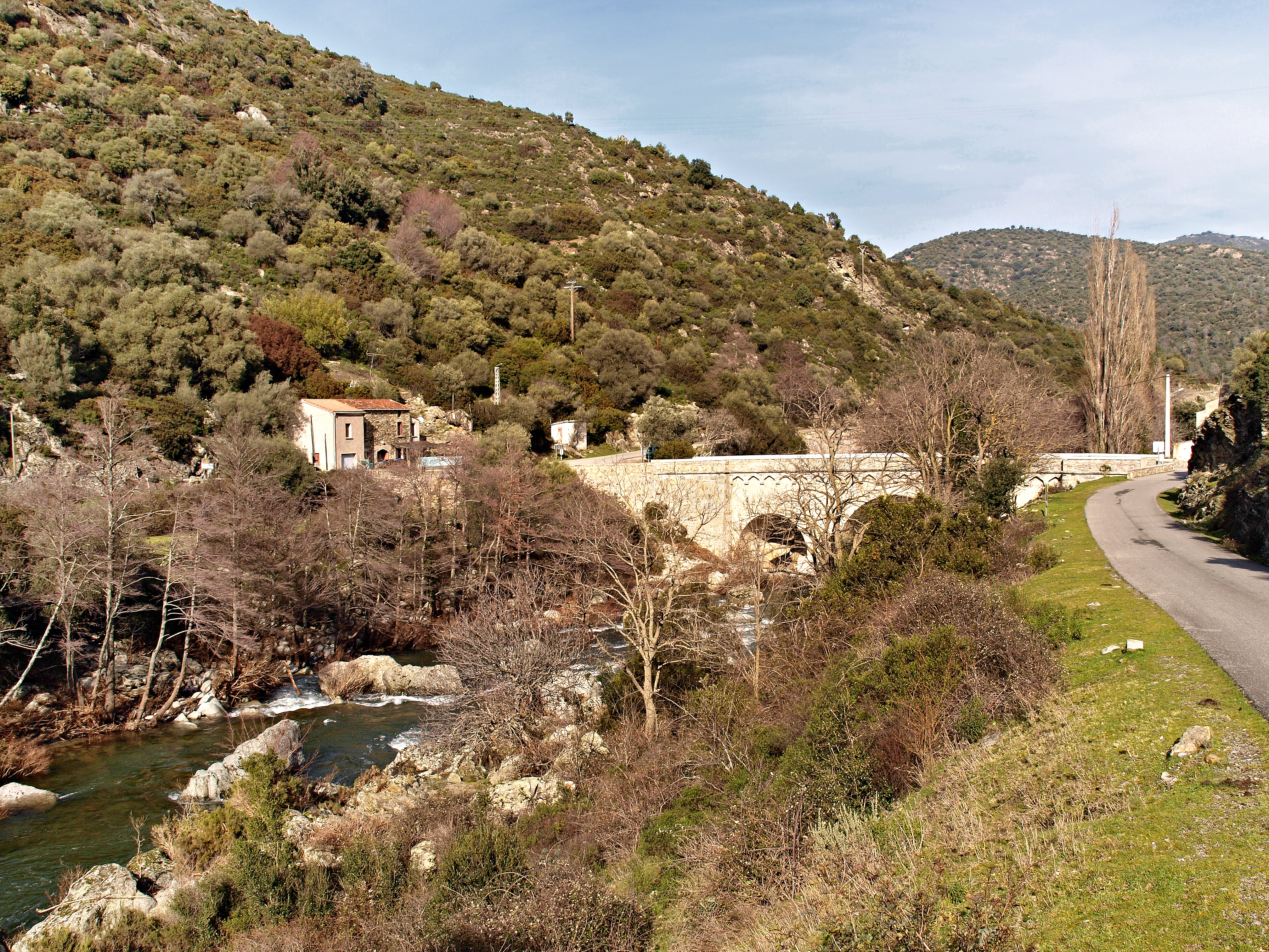 Castirla (Corsica) - Pont de Castirla